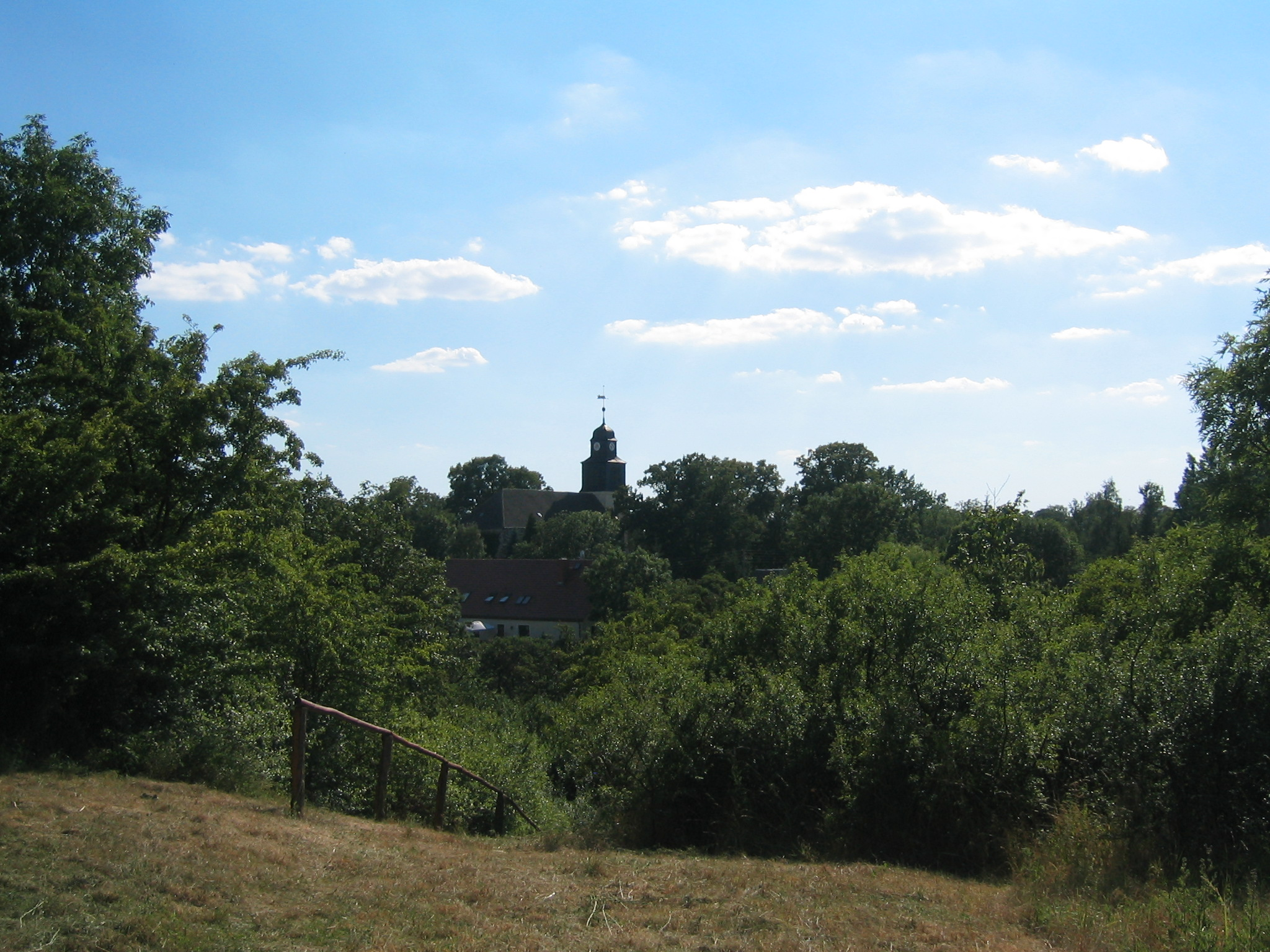 Der Wallberg in Blankenburg (Uckermark). Blick vom Wallberg am Abstieg.